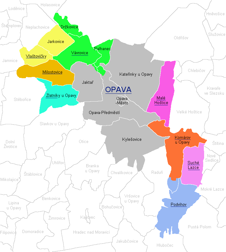 Opavské současné městské části s katastrálními územími